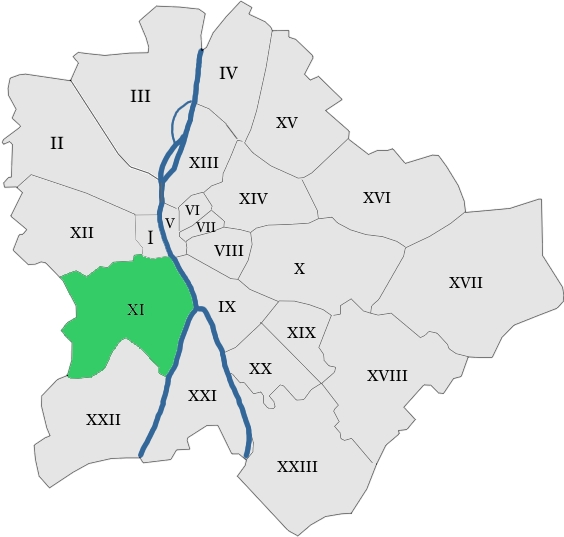 map hungary budapest district 11